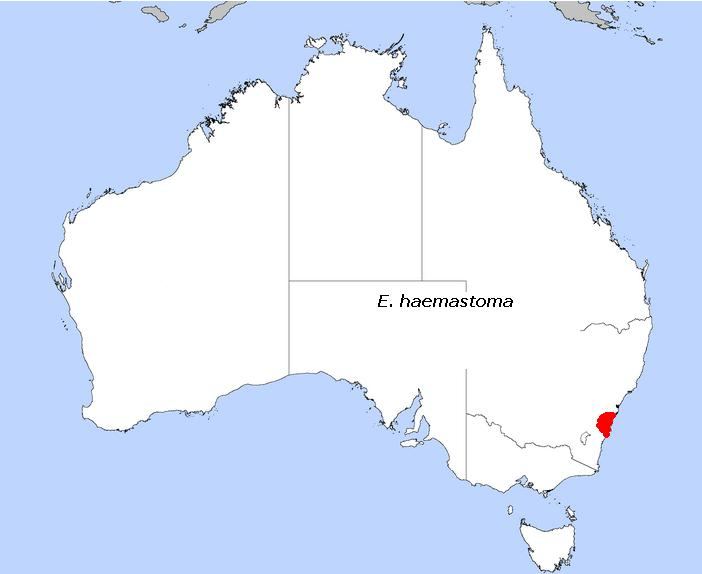 Carte de distribution d'Eucalyptus haematoma